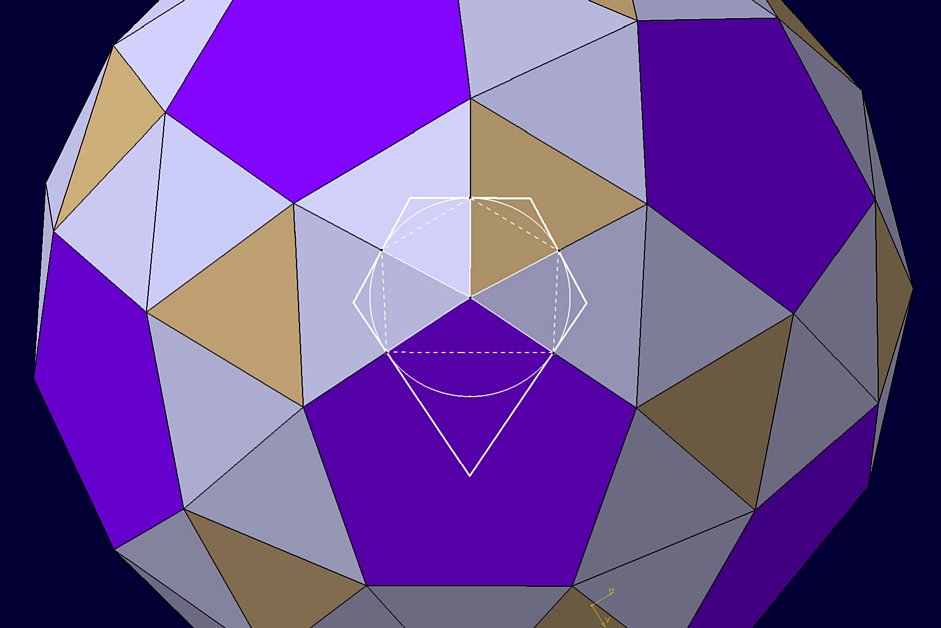 Konstruktion des Tangentenfünfecks für das Pentagonhexakontaeder am dualen abgeschrägten Dodekaeder